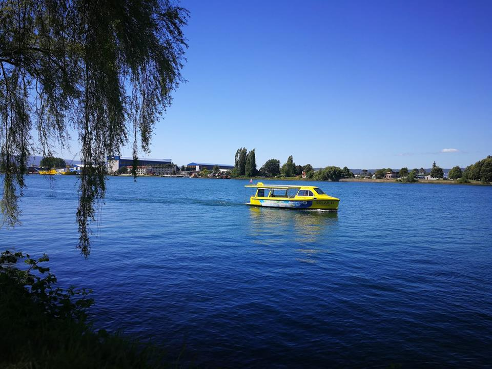 paseando por valdivia